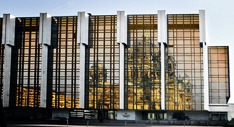 Der Palast der Republik in Berlin mit dem Berliner Dom. Aufgenommen im Jahr 1990.